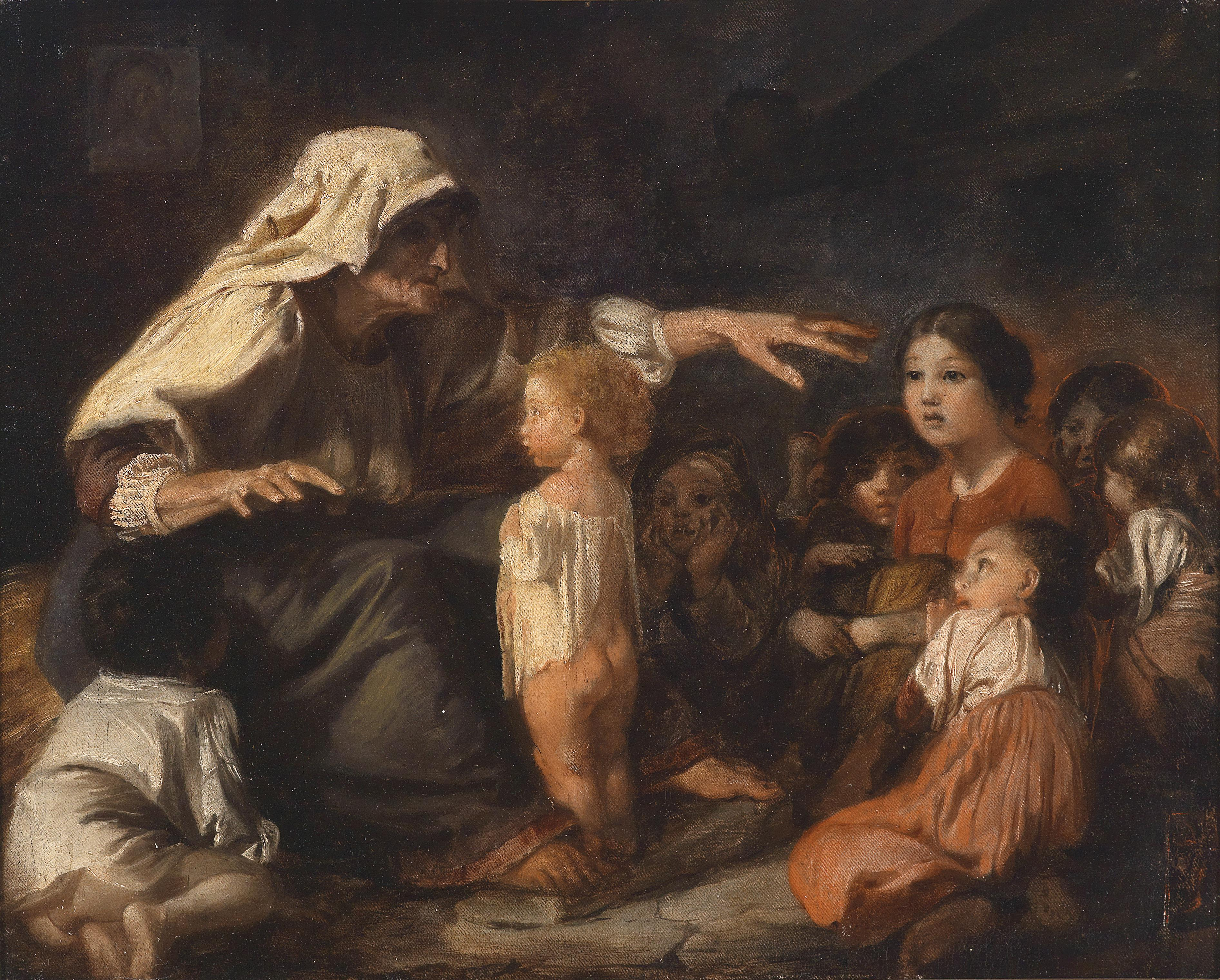 Spannende Geschichte. Öl auf Leinwand, 37,5 x 48 cm. Provenienz: Nachlass Clemens von Franckenstein (1875-1942)